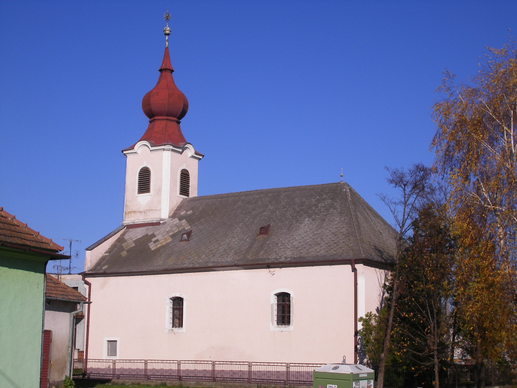 Csilizpatas - református templom